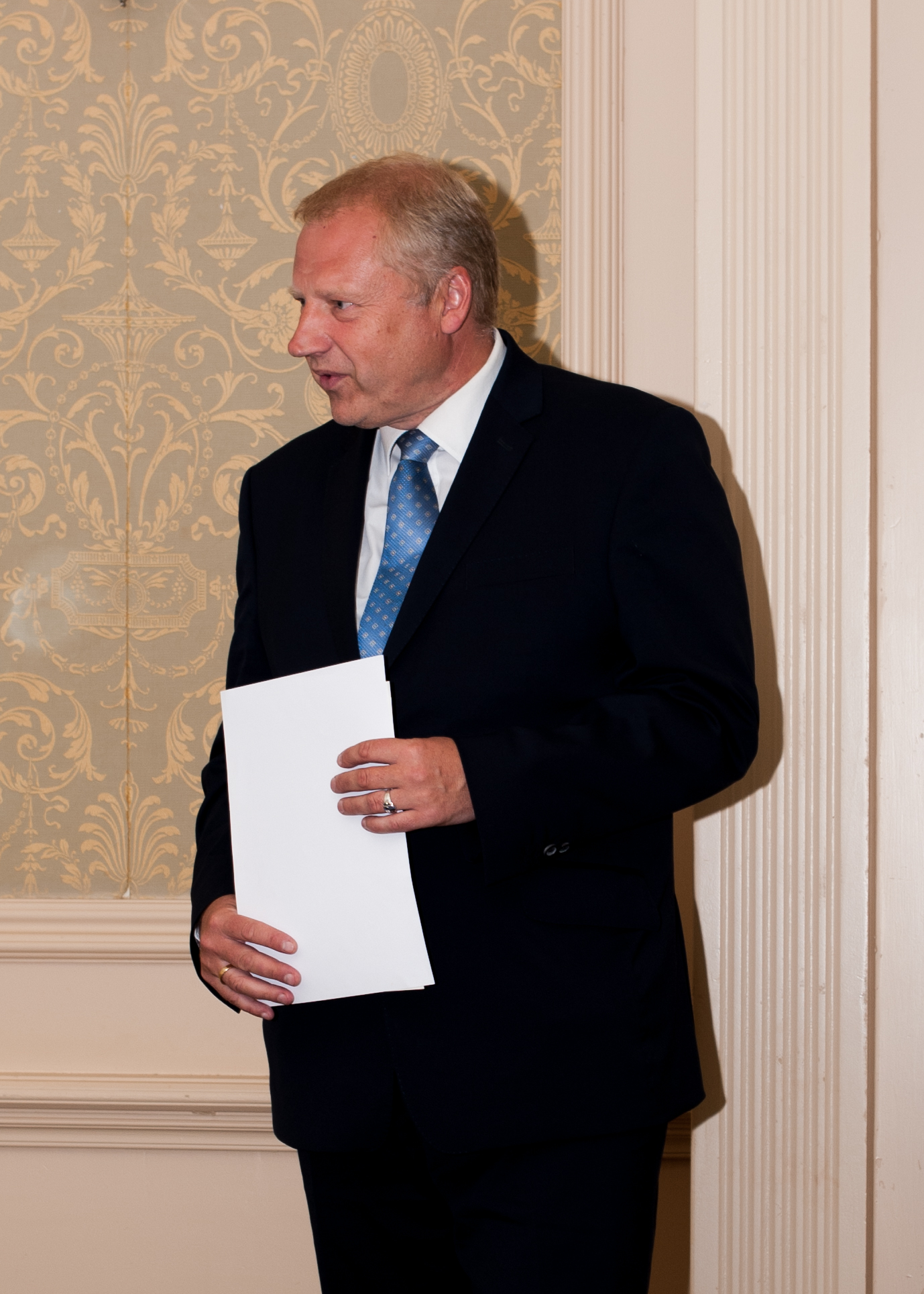 Rainer Saks, välisministeeriumi kantsler